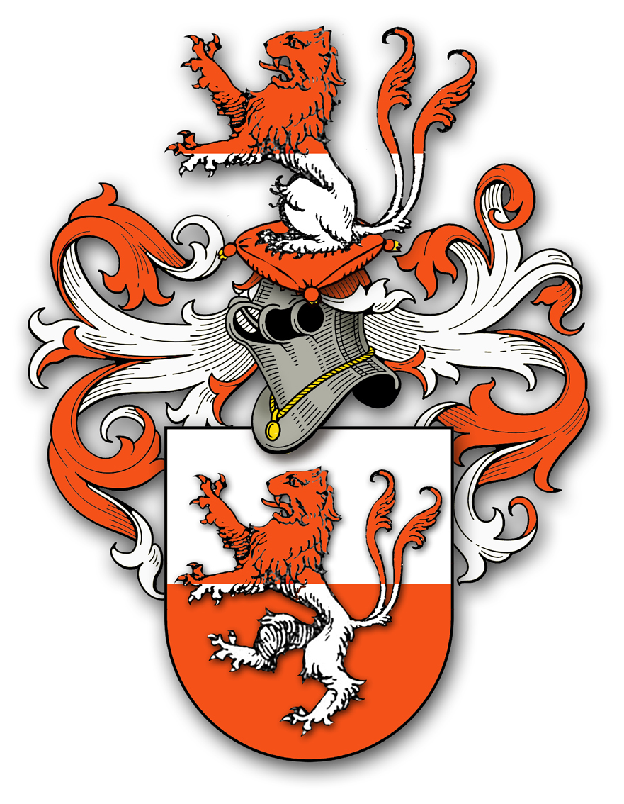 Brasão Khuen Belasi